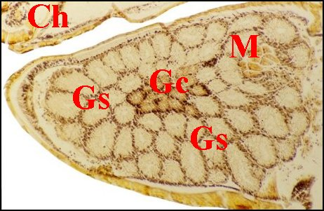 Glandes de deux types dans la gnathocoxa mâle d' Aculepeira ceropegia